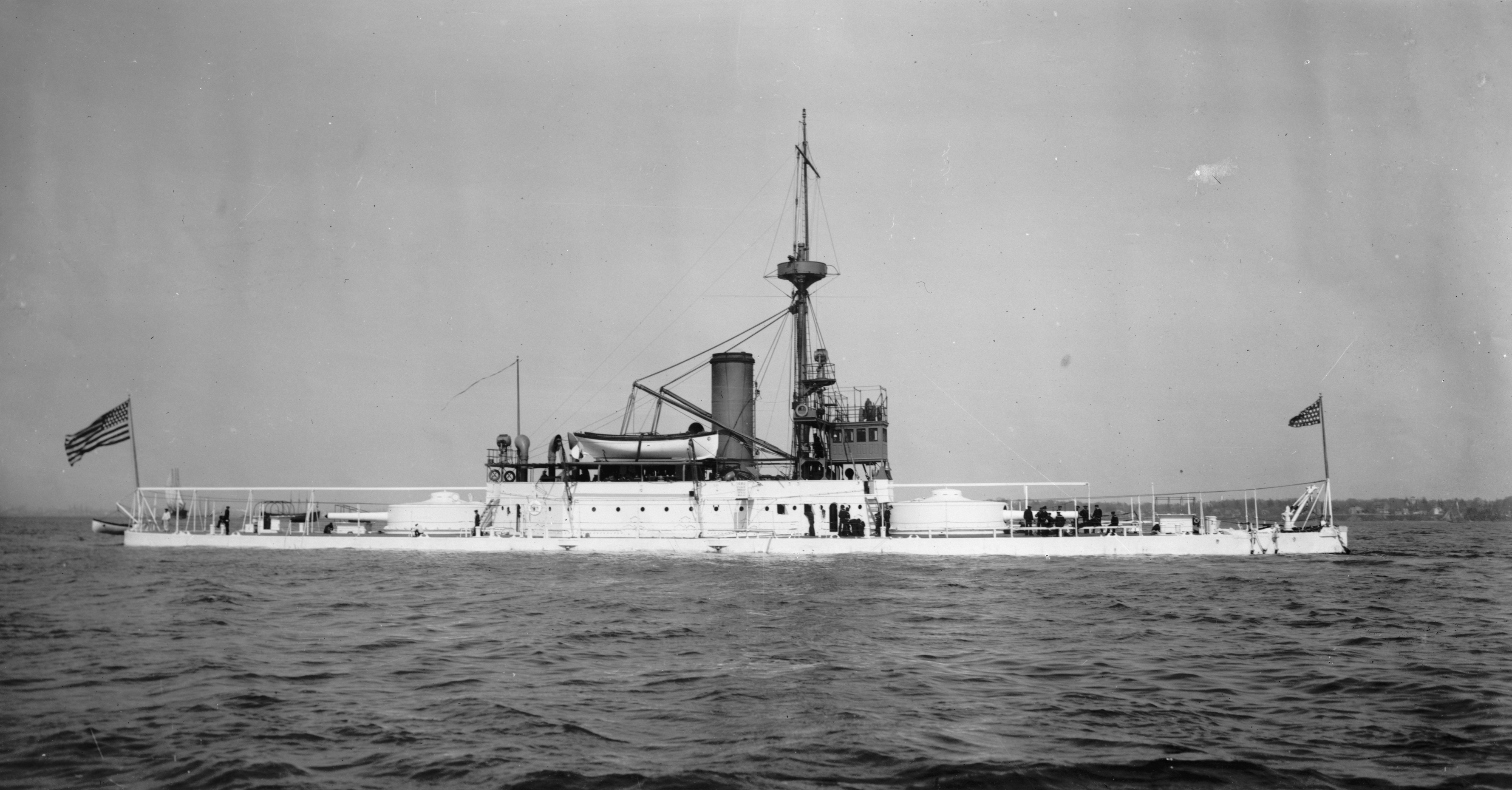 USS Terror